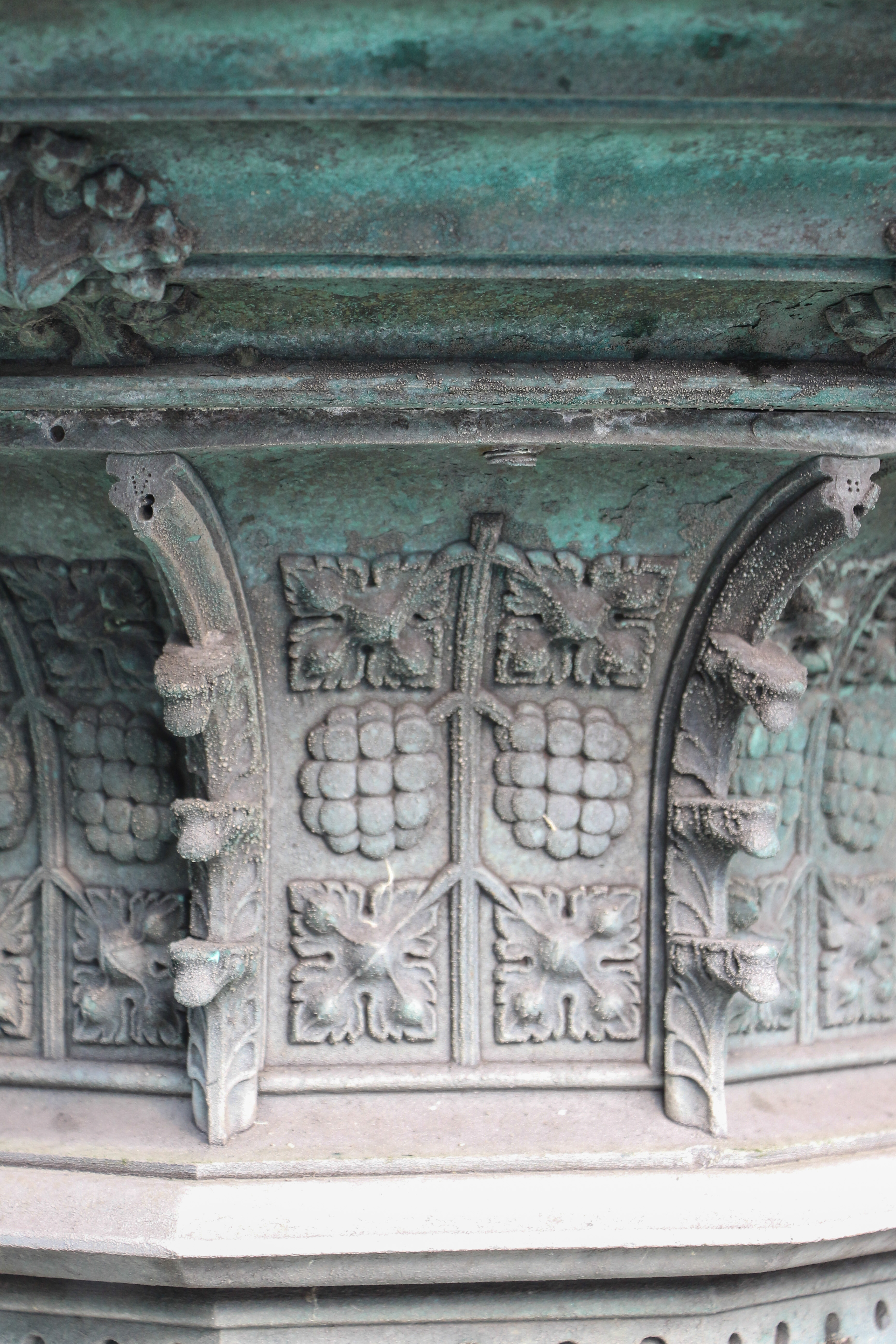 Hase-Brunnen in Hannover Der 1881 zuerst mittig vor dem Alten Rathauses aufgestellte Hase-Brunnen (schlicht auch: Marktbrunnen) ist ein Werk verschiedener Künstler: Den Entwurf für den zweischaligen Laufbrunnen mit Fisch- und Blumenverkäuferin lieferte der Architekt Conrad Wilhelm Hase. Die Figuren selbst stammen von Friedrich Wilhelm Engelhard nach einer Zeichnung von Hermann Schaper. Die Ornamente lieferte Theodor Massler, während Hermann Gladenbeck in Berlin (später: Gladenbeck & Sohn) den Guss besorgte. 1960 wurde der Brunnen auf Hannovers ältestem (bekannten) Marktplatz an den heutigen Standort versetzt. Der Hase-Brunnen hatte zwei Vorläufer, darunter den 1551 errichteten Piepenborn.